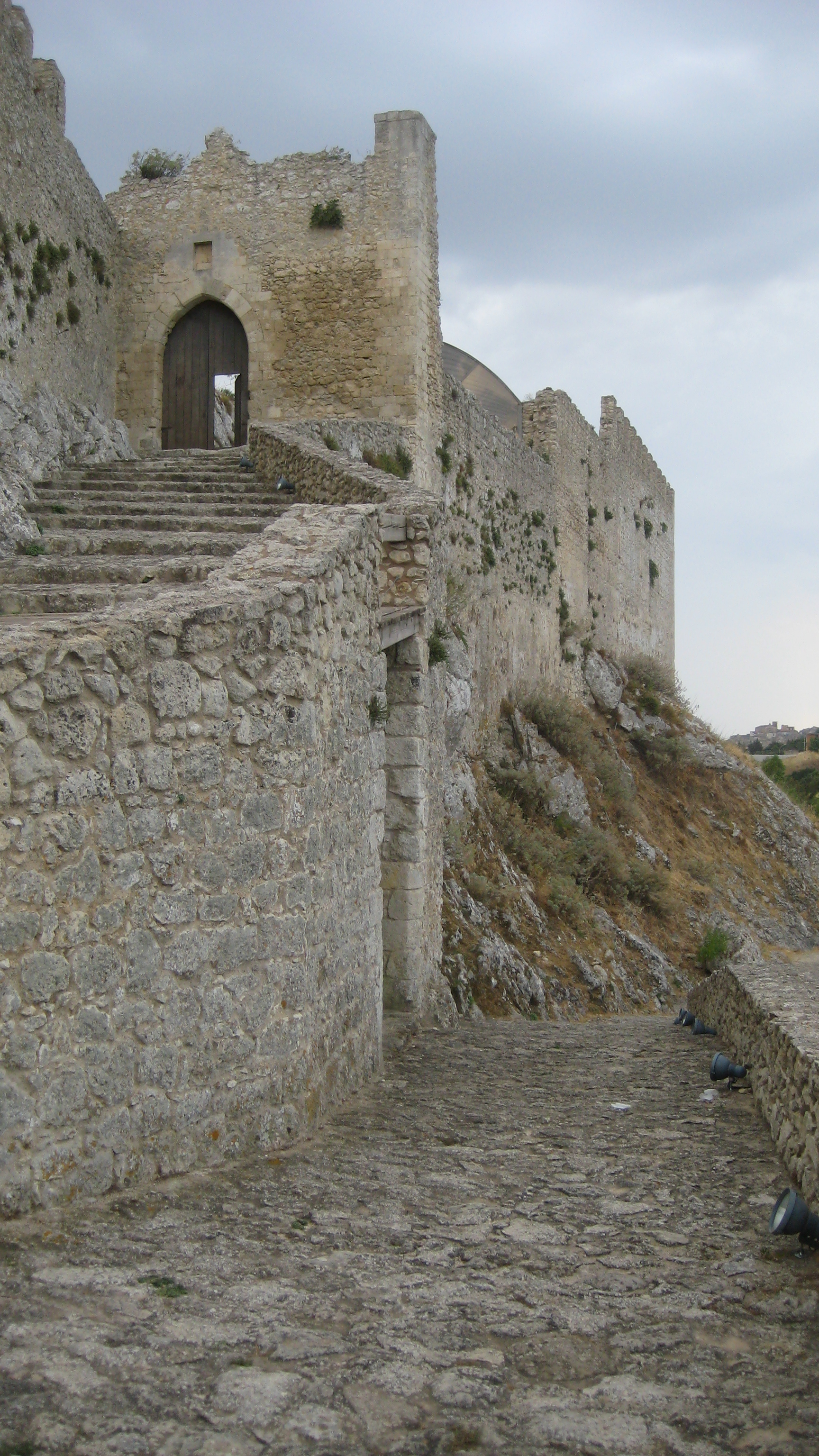 Accesso delle mura esterne del castello di Mussomeli (o Castello Manfredonico), a Mussomeli (provincia di Caltanissetta, Sicilia)